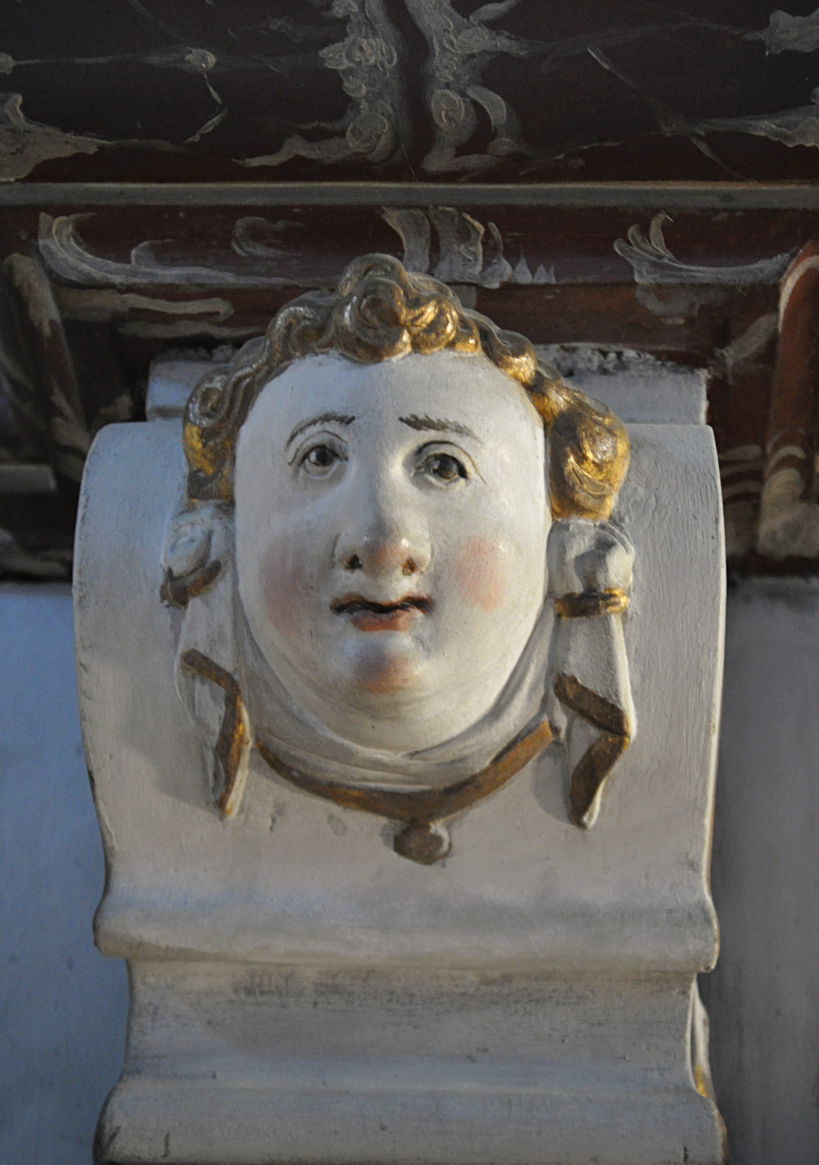 Skulpterad putti på epitaf utförd 1641-43 av Peter Cran i Öja kyrka (BBR-ID 21400000444124), Gotland. Inskriften meddelar att epitafiet upprättats av kyrkoherden i Öja, Christen Christenssen Nestvediensis, (f. i Nestved Sjaelland, 1594) och hans andra hustru Margareta Nilsdotter (prästdotter från Garda), då han var i sitt 49:e och hon i sitt 25:e år, alltså det sist angivna årtalet (1641 anger årtalet för första hustruns död). Inskriften har tillkommit efter Margaretas död 1694.